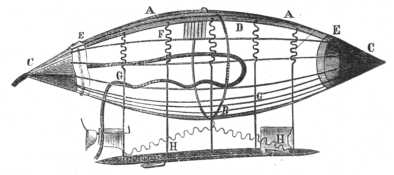 Picture from "Возможен ли металлический аэростат"